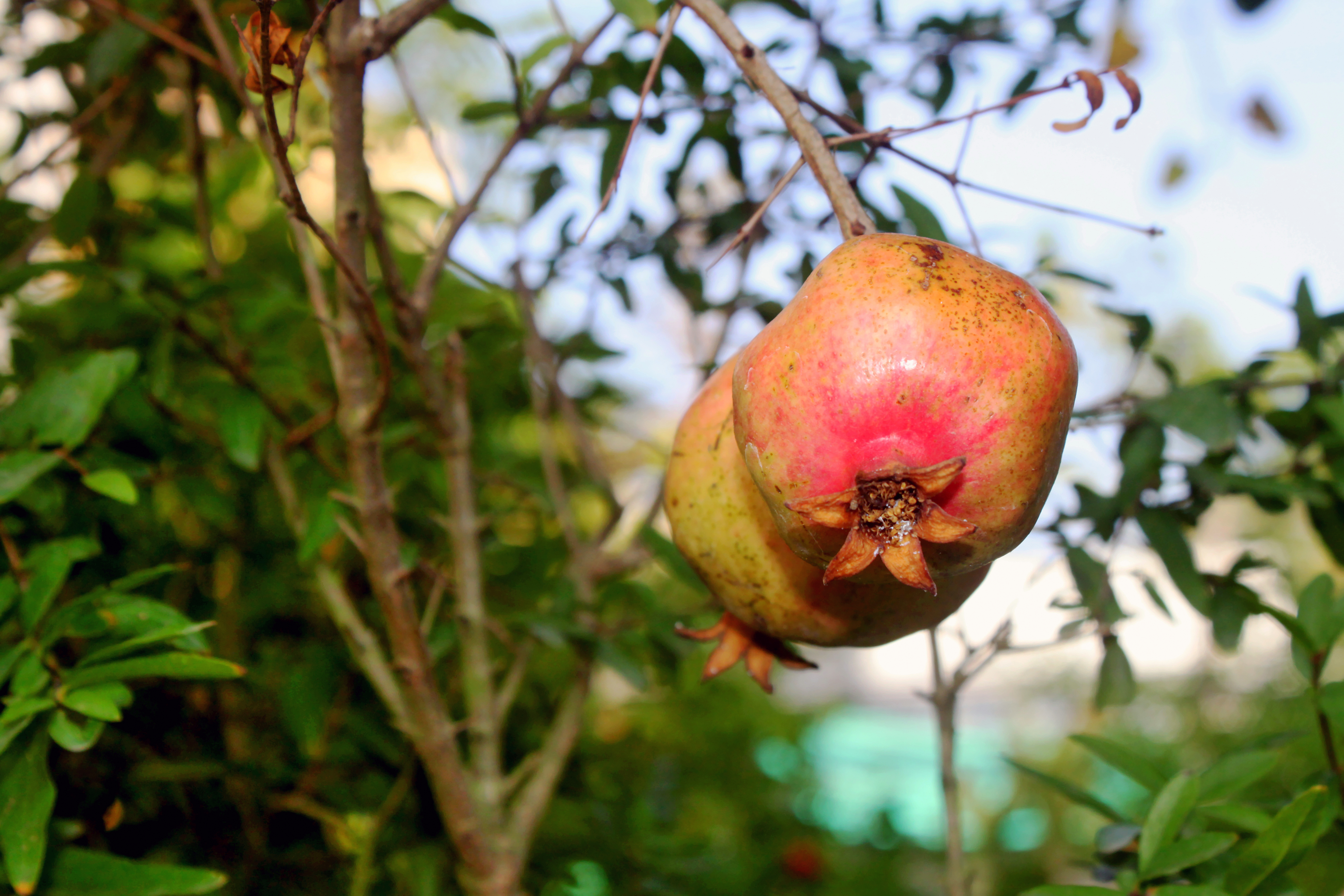 Quả lựu